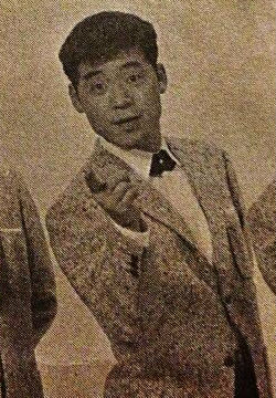 昭和40年